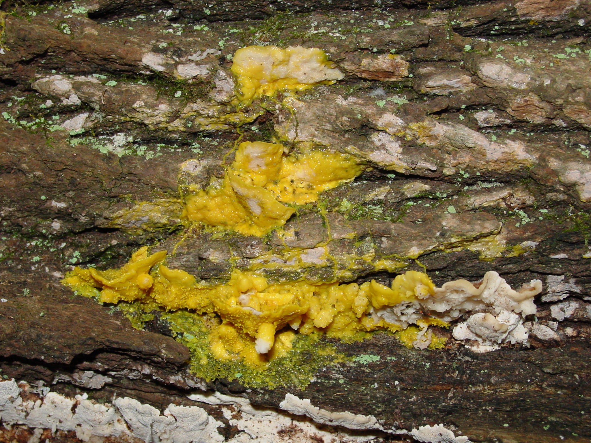 Evansburg State Park, Worcester, PA. DSC01800